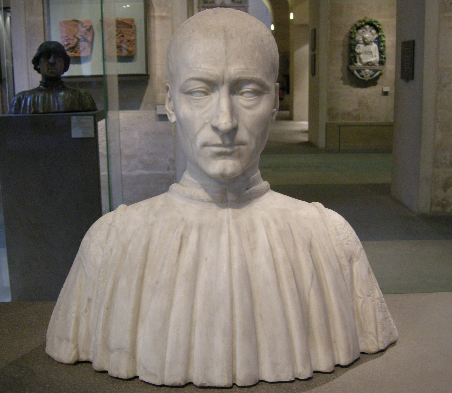 Filippo Strozzi (1429-1491). Busto al Museo del Louvre di Parigi.